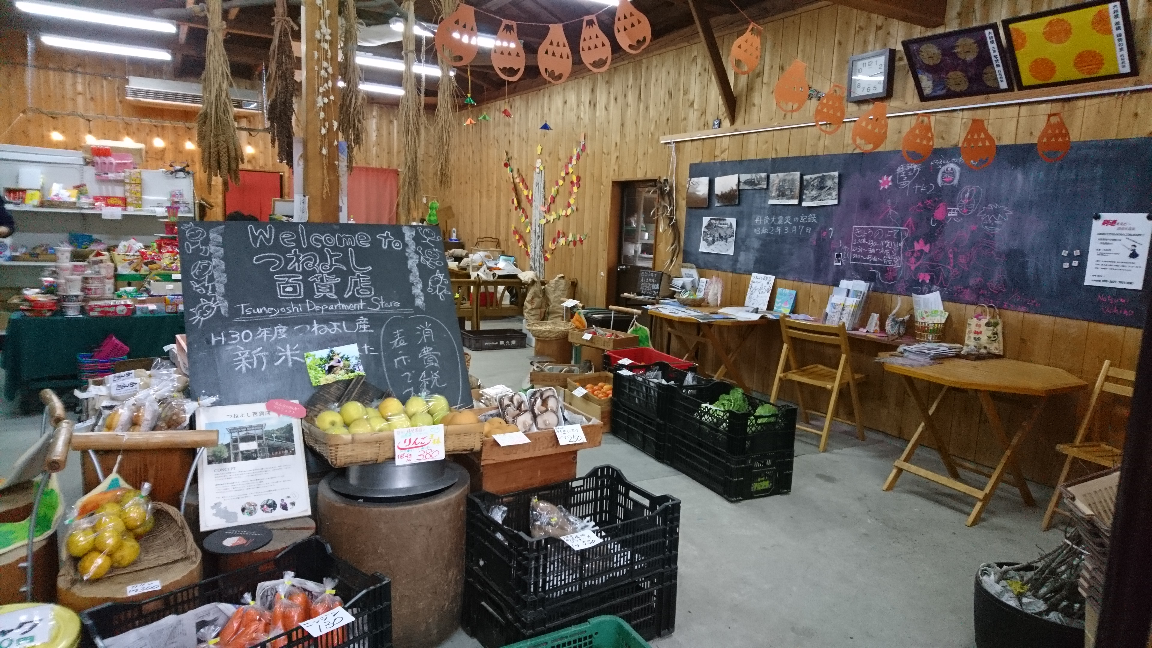 京丹後市大宮町にある「チャレンジ！つねよし百貨店」の店内